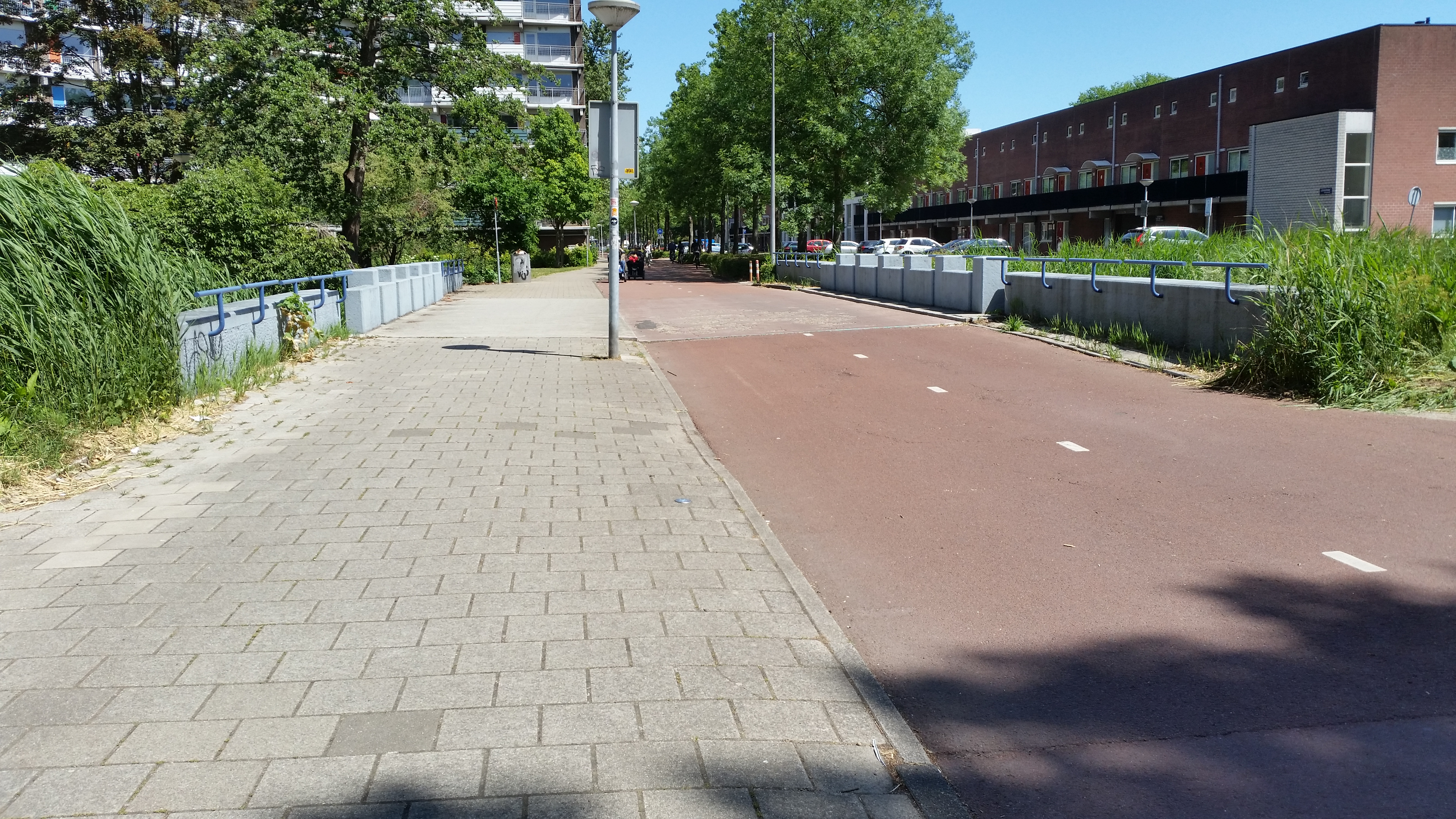 Impressie van de Loenermarkbrug (brug 935) in Amsterdam-Noord.